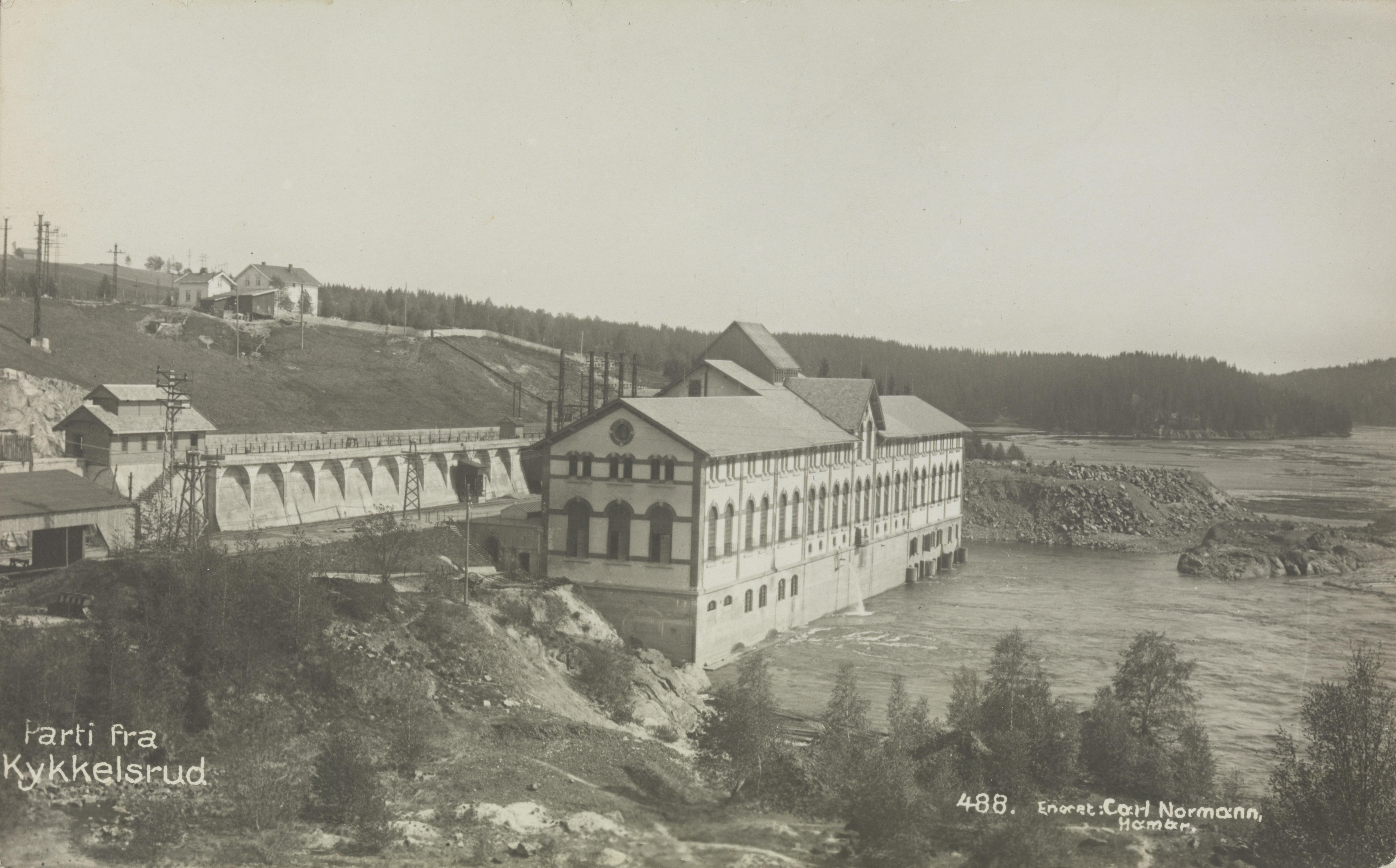 Bildet er hentet fra Nasjonalbibliotekets bildesamling